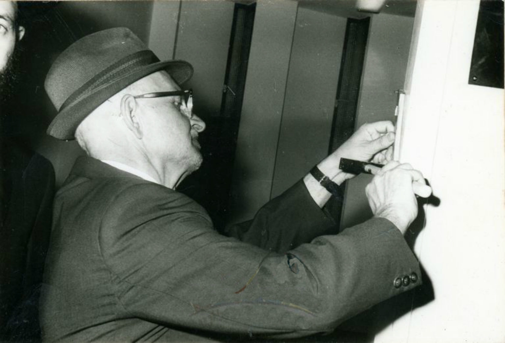 משה פראגר ממייסדי הבנין ומי שנדב את המגרש, קובע מזוזה בחנוכת הבית של כולל גור בבני ברק.